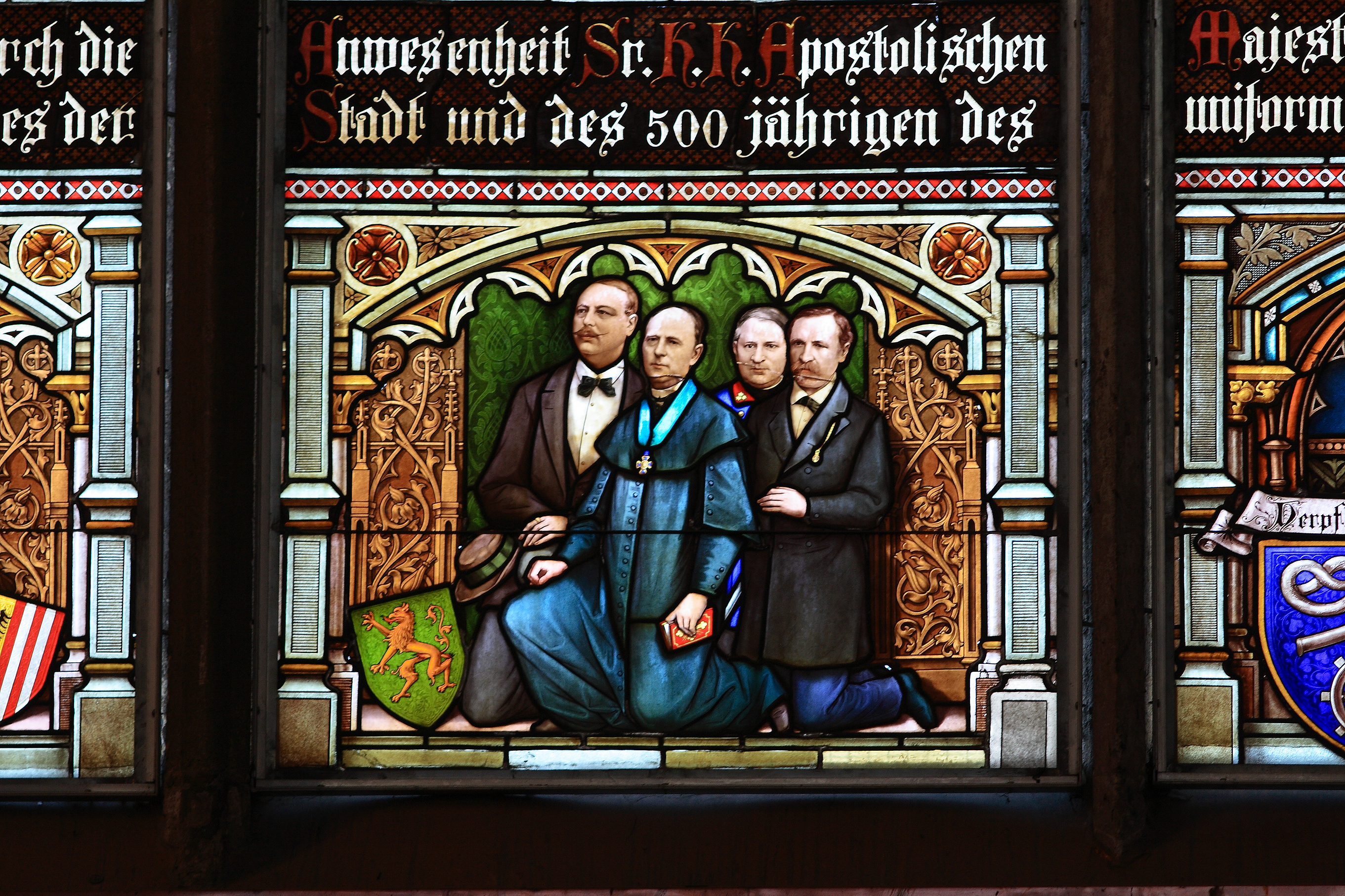 Stifterporträts am Bürgerschaftsfenster in der Steyrer Stadtpfarrkirche. Zu sehen sind von links nach rechts: Josef Werndl, Stadtpfarrer Georg Arminger, Bürgerkorps-Kommandant Franz Pichler und Bürgermeister Georg Pointner. Das Fenster wurde am 30. Oktober 1893 enthüllt, ausführendes Unternehmen war Carl Geyling’s Erben in Wien